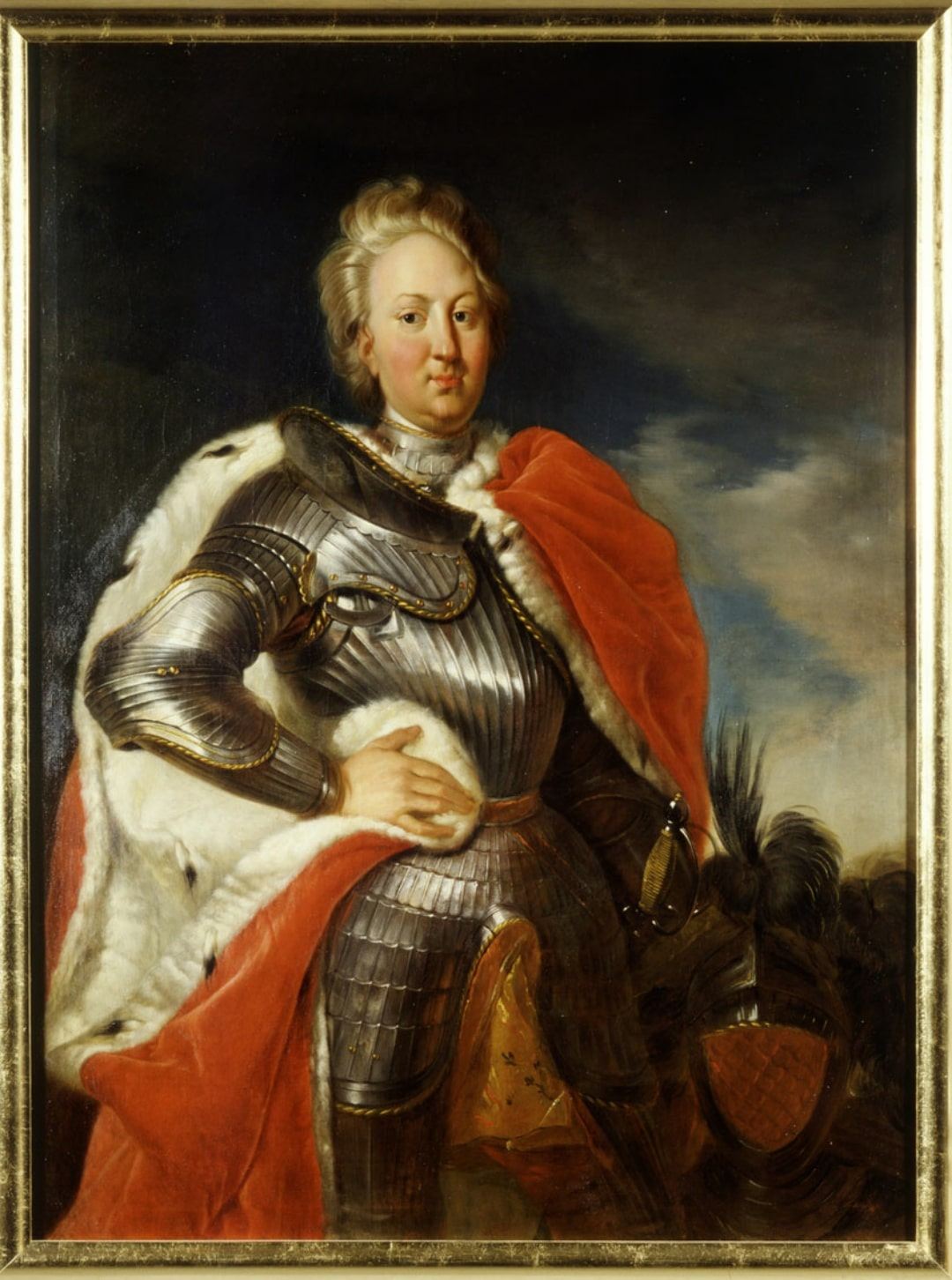 Markgraf Karl III. Wilhelm von Baden-Durlach (1679-1738)